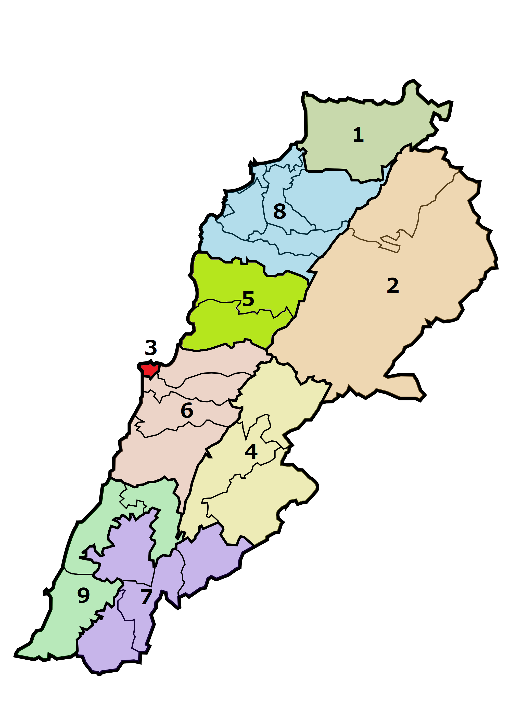 レバノンの行政区画（英訳順） Akkar Baalbek-Hermel Beirut Beqaa Keserwan-Jbeil Mount Lebanon Nabatieh North South